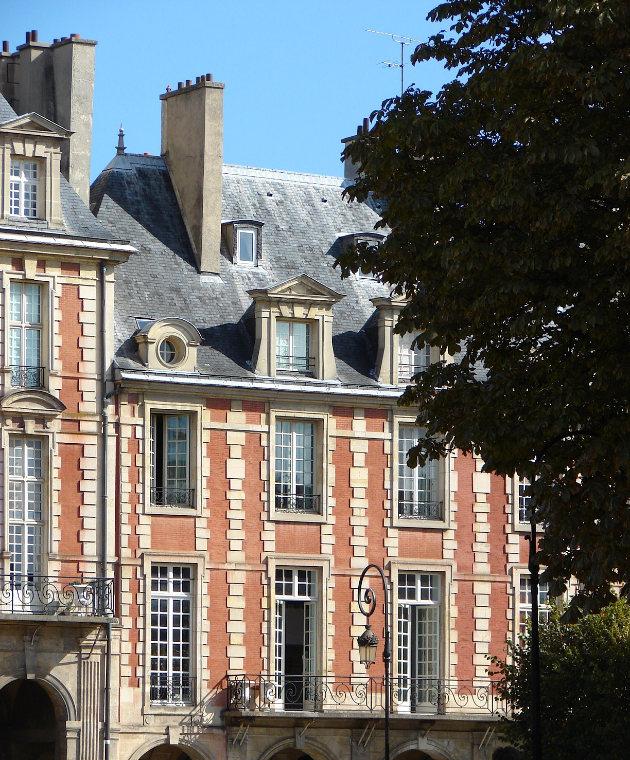 Hôtel de Tresmes - 26 Place des Vosges - Paris 3 Vue générale de la façade de l'hôtel de Tresmes